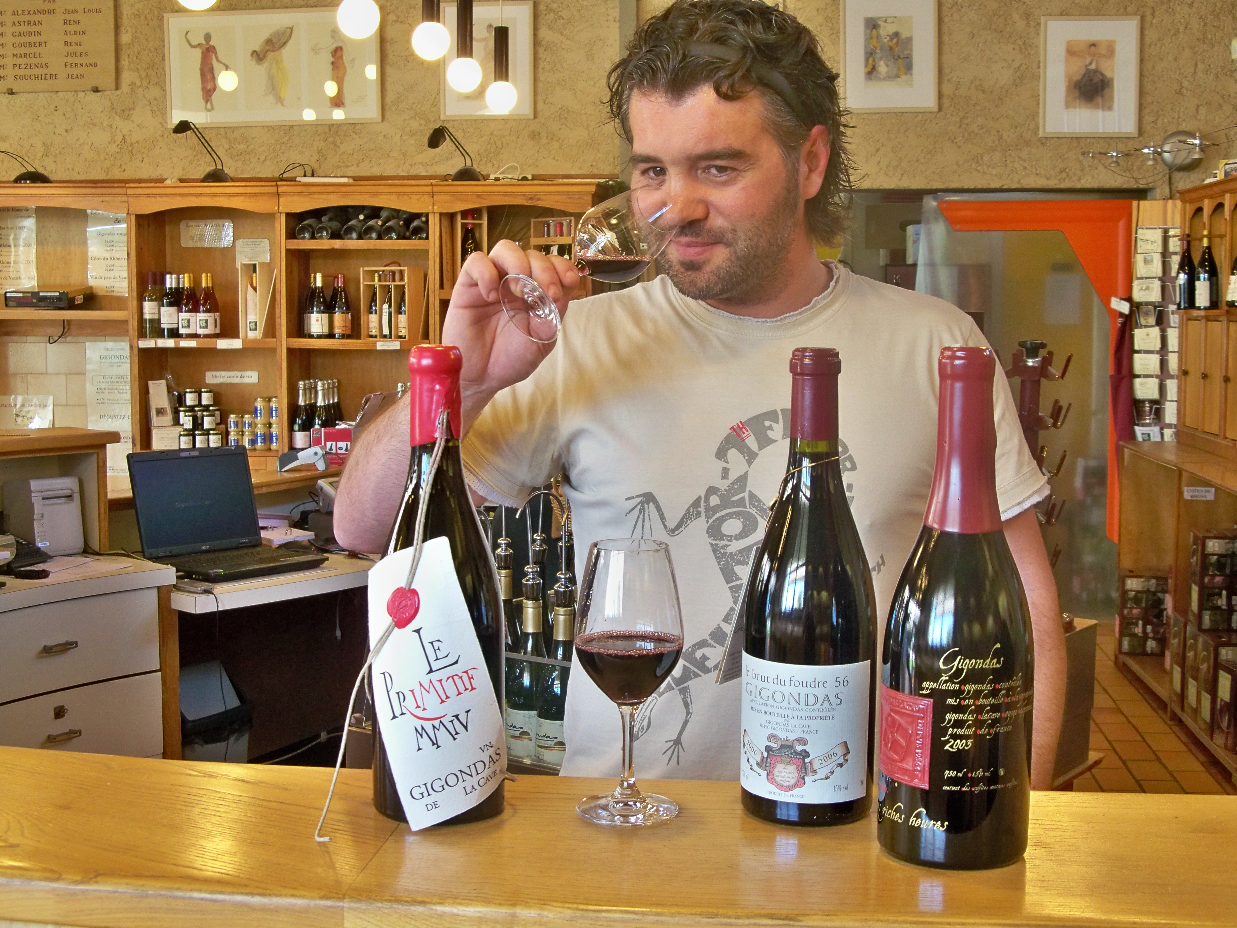 Dégustationde Gigondas, en cave